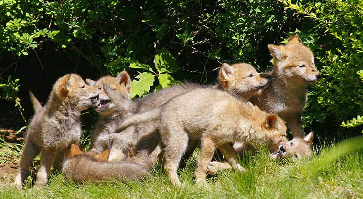 Coyote (Canis latrans) pups